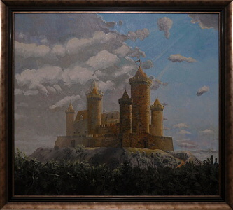 Hrad Konopiště, olej na plátně 91x82 cm